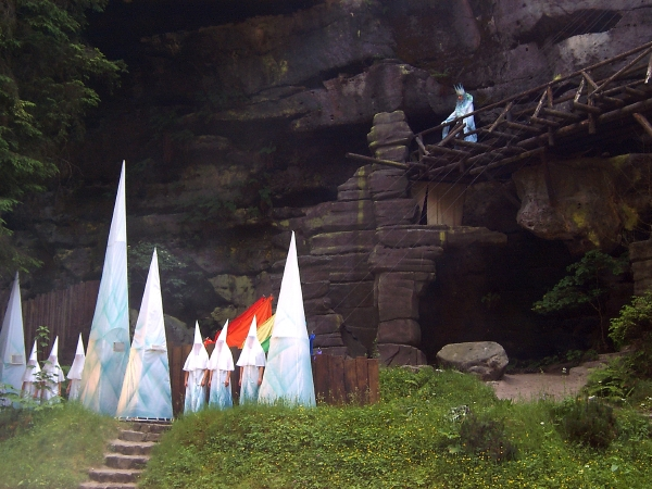 Felsenbühne Rathen, Sächsische Schweiz (Saxon Switzerland), Kindermusical "Der Regenbogen" Performance of the Landesbühnen Sachsen (Saxony’s traveling repertory theater) on the Felsenbühne (natural amphitheater) Rathen